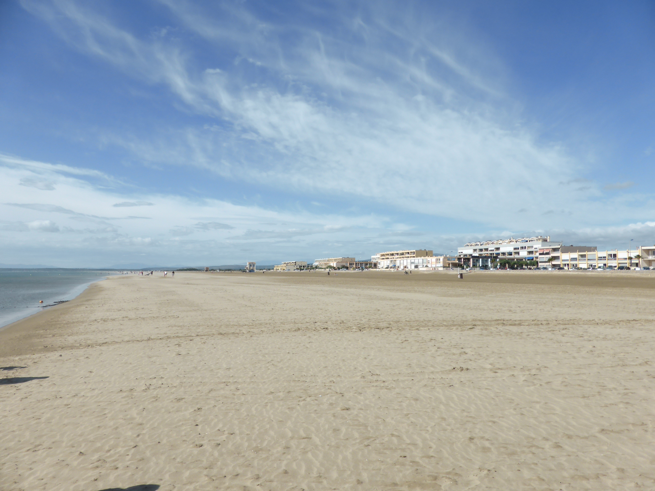 Plage de la station de Port la Nouvelle l'été